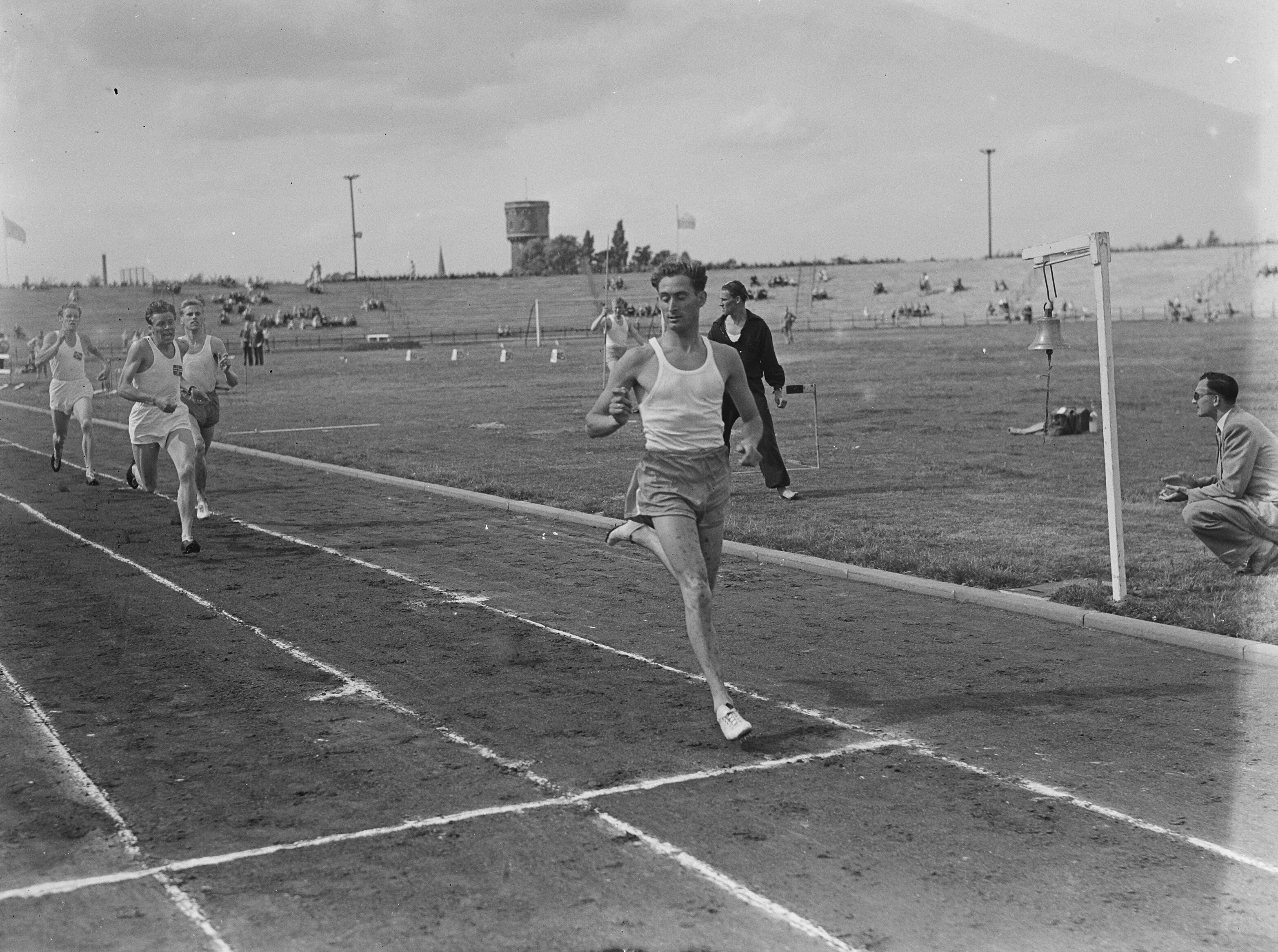 Collectie / Archief : Fotocollectie Anefo Reportage / Serie : [ onbekend ] Beschrijving : Atletiek Nederland tegen Noorwegen te Hengel.o 1500 meter: Slijkhuis, Hannestad, Harting, Hoiland Datum : 20 augustus 1950 Locatie : Hengelo, Overijssel Trefwoorden : atletiek Persoonsnaam : Hannestad, R., Harting, H., Hoiland, O., Slijkhuis, Wim Fotograaf : Noske, J.D. / Anefo Auteursrechthebbende : Nationaal Archief Materiaalsoort : Glasnegatief Nummer archiefinventaris : bekijk toegang 2.24.01.09 Bestanddeelnummer : 904-1400